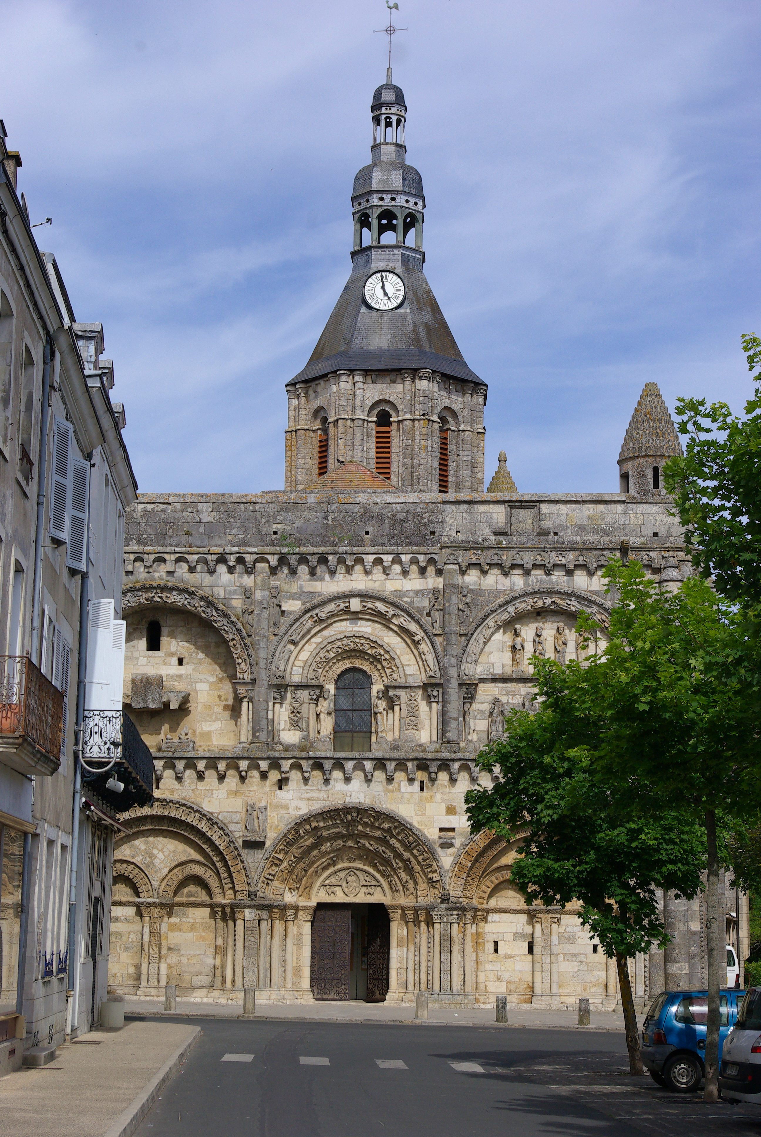 Situation de l'église Saint-Nicolas de Civray, Vienne, France. .